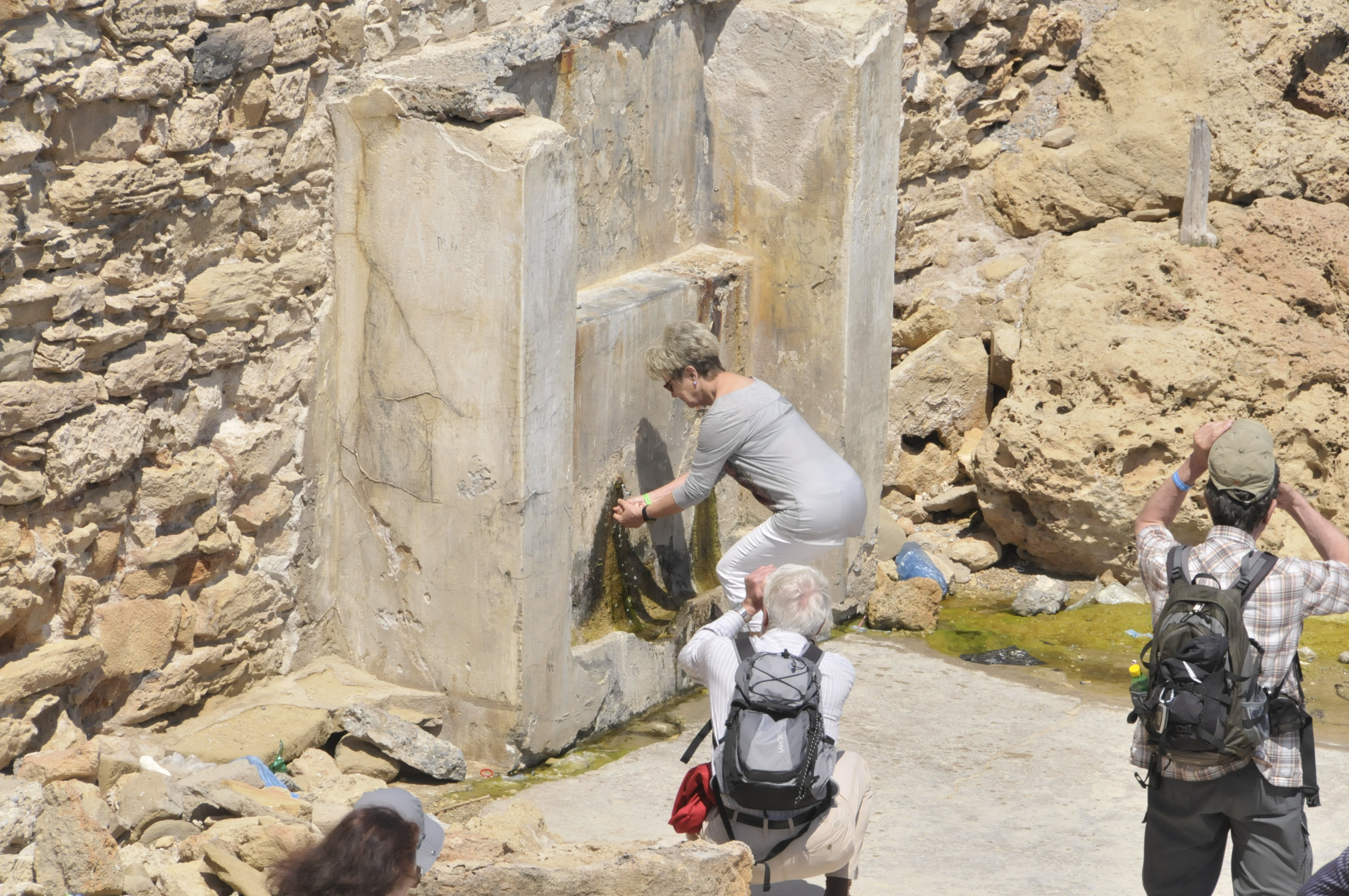 Apostel-Andreas-Kloster, Nordzypern, St.-Andreas-Quelle